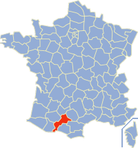 Haute-Garonne.